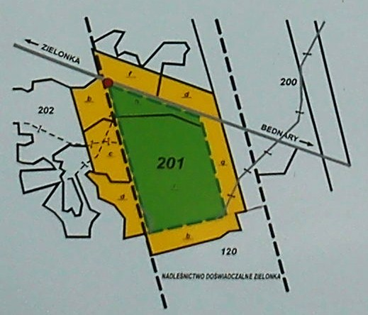 Rezerwat Las mieszany w nadlesnictwie Łopuchówko. Tablica informacyjna, fragm.